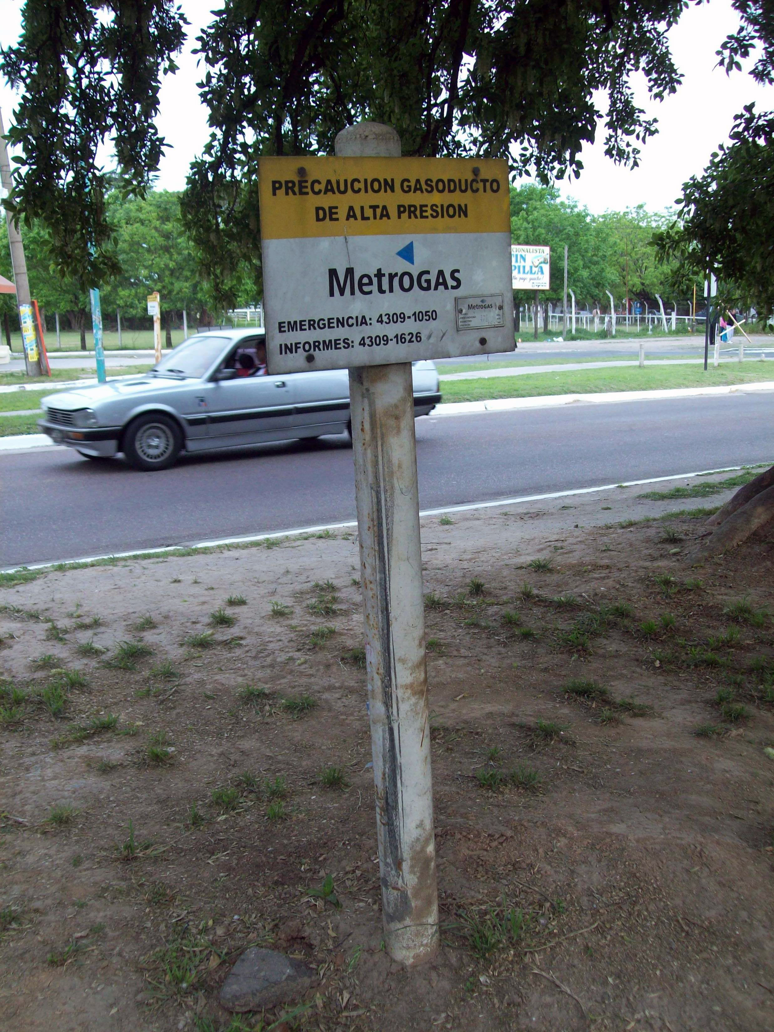 Señal que indica la presencia de un gasoducto de alta presión subterraneo, Avenida San Martín, Florencio Varela.